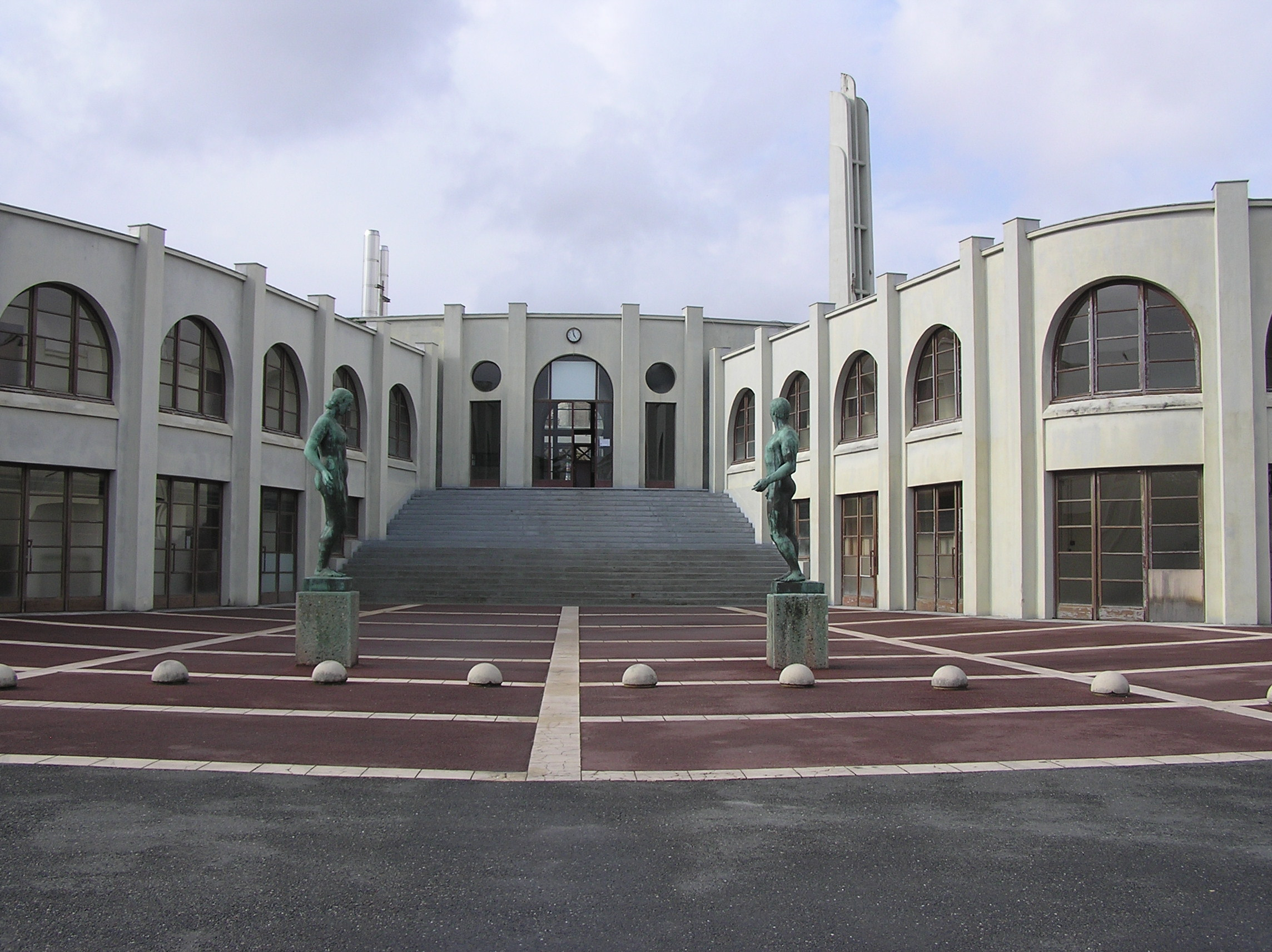 Bordeaux Stade Lescure entrée